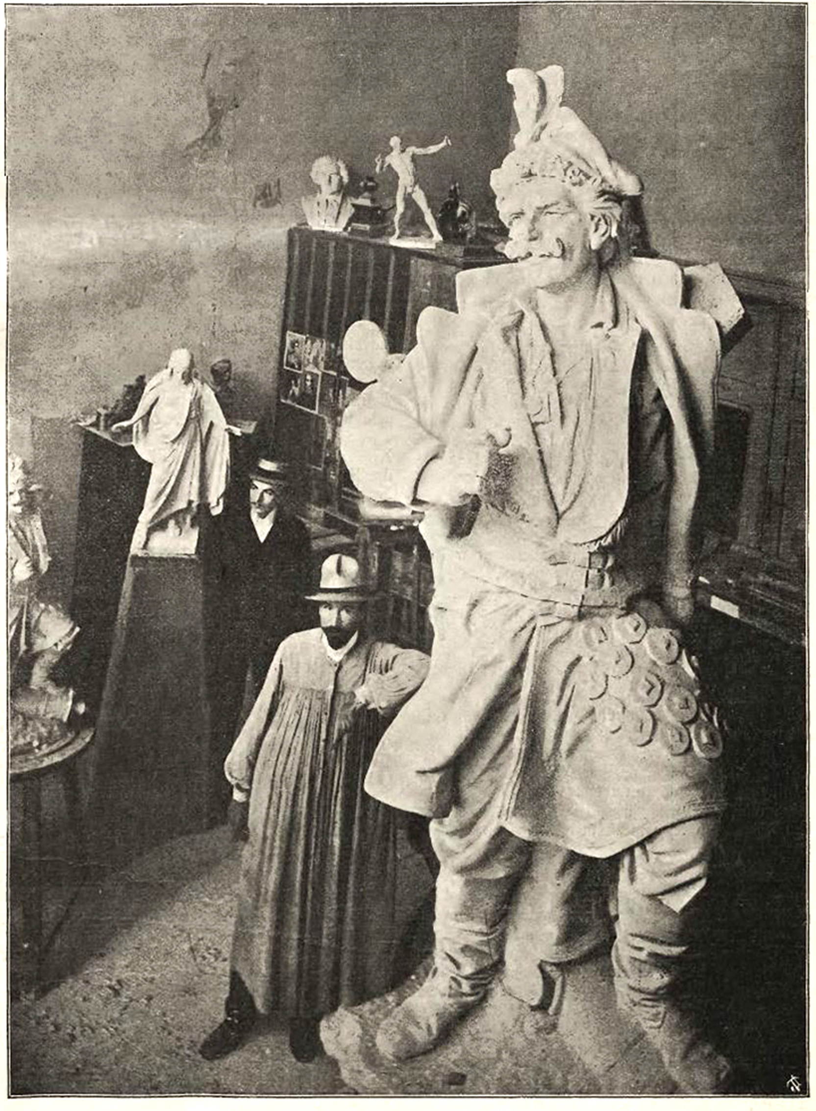 Григорій Кузневич під час роботи над пам`ятником Бартошу Гровацькому для Львова (вирізка з газети "Nowosci Illustrowane")